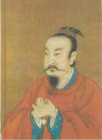 Emperor Dezong of Tang dynasty